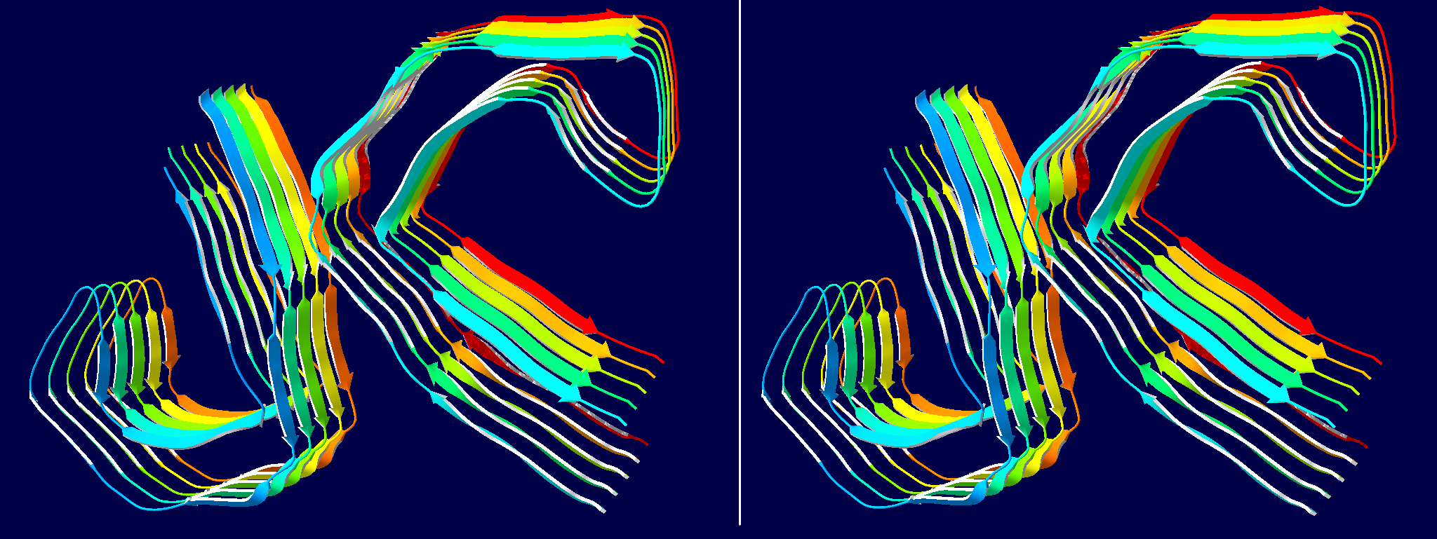 3-dimensionale Struktur des tau-Proteins aus den neurofibrillären Bündeln eines Alzheimer-Patienten, bestimmt durch Cryo-Elektronenmikroskopie (PDB-code 5o3t). Die Abbildung wurde mit DeepView erstellt.